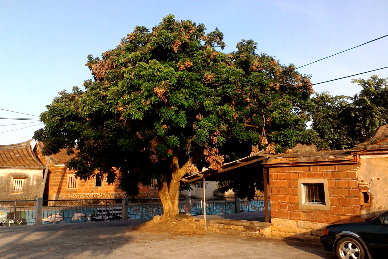 金寧鄉下堡聚落龍眼樹,福建省金門縣金寧鄉盤山村